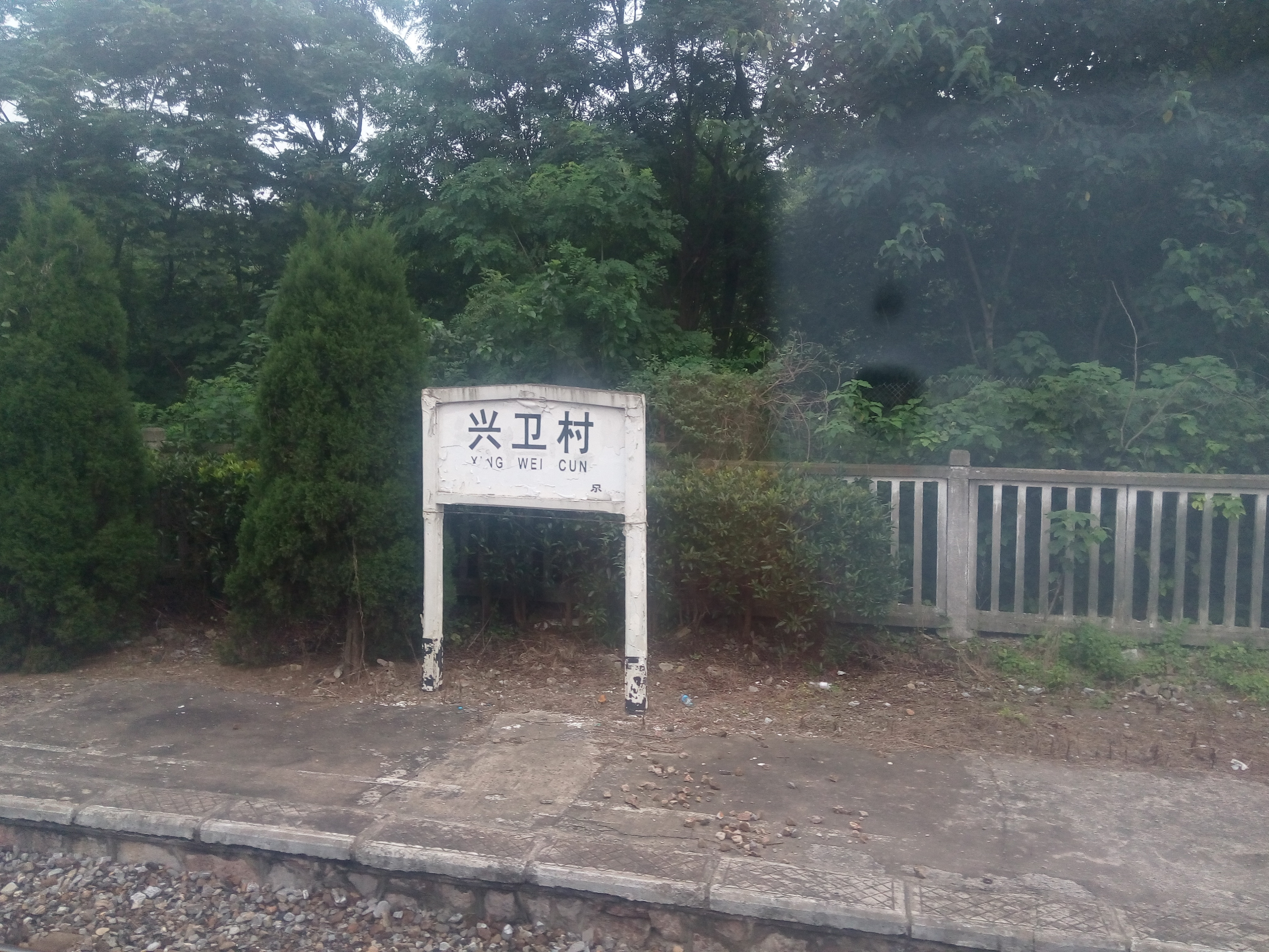 兴卫村站。